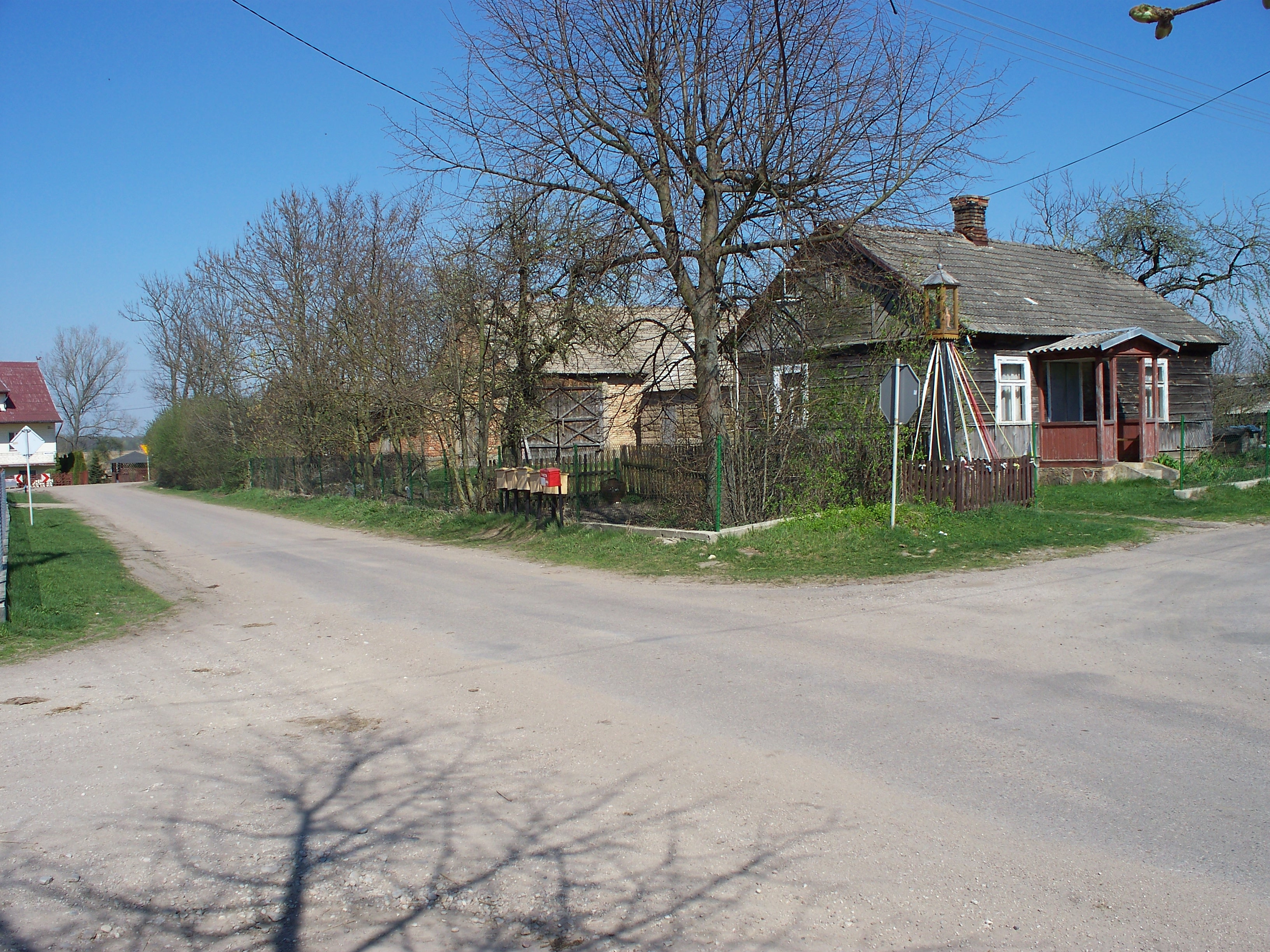 Układ ten pochodzi z XVI wieku. Na fotografii w tle u zbiegu ul. Psiej i Konowrót znajduje się kapliczka z rzeźbą Chrystusa Frasobliwego.